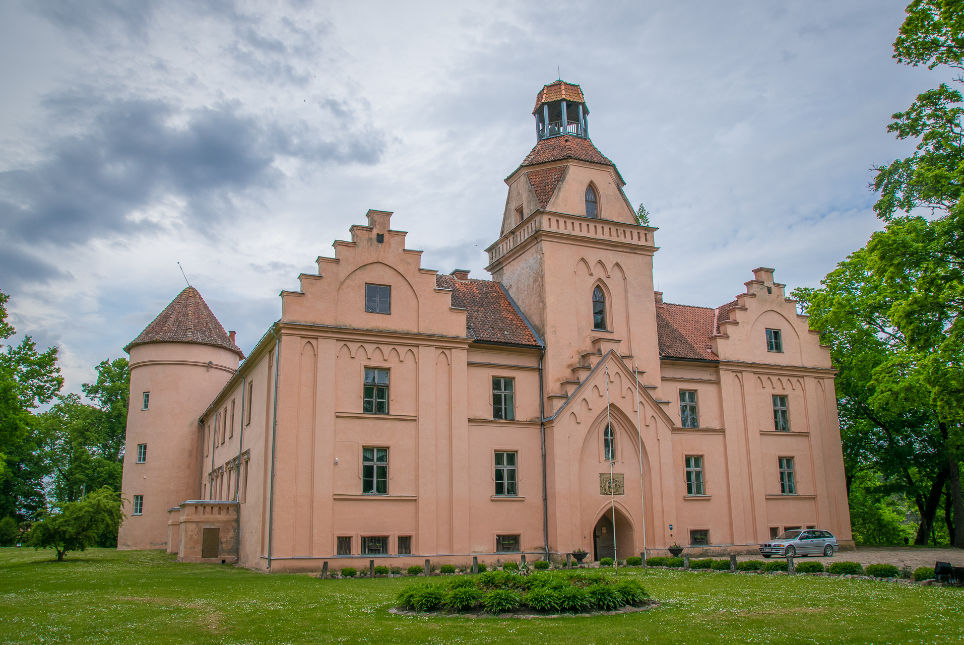 Ēdoles pils ar nocietinājuma grāvjiem un parku, Ēdole